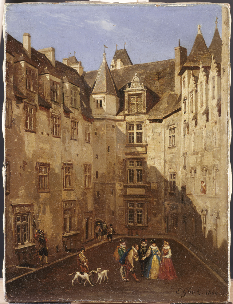 Vue de la cour du château de Pau (avec des personnages d'époque Renaissance).